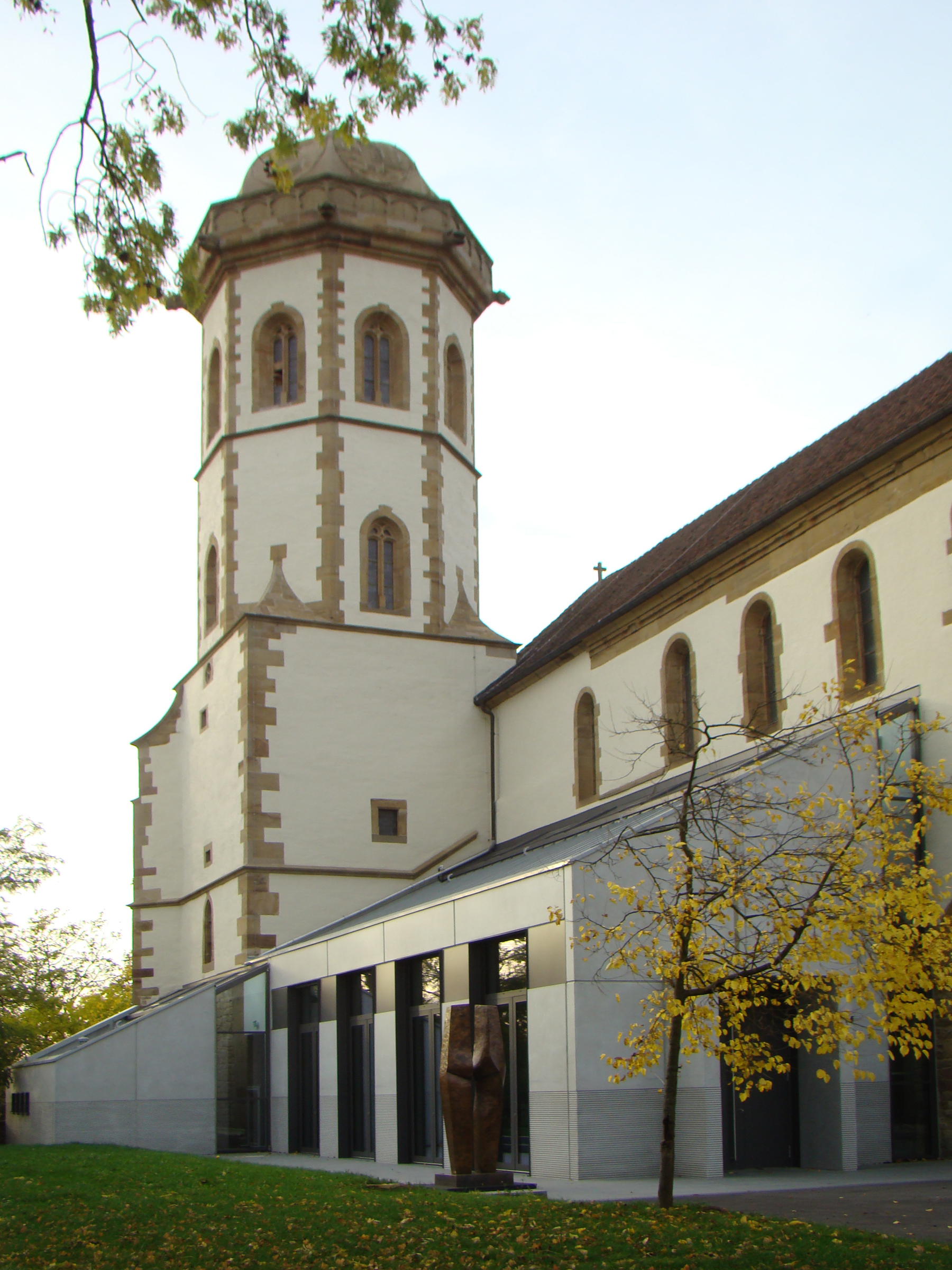 Stift Sinsheim, Stiftskirche